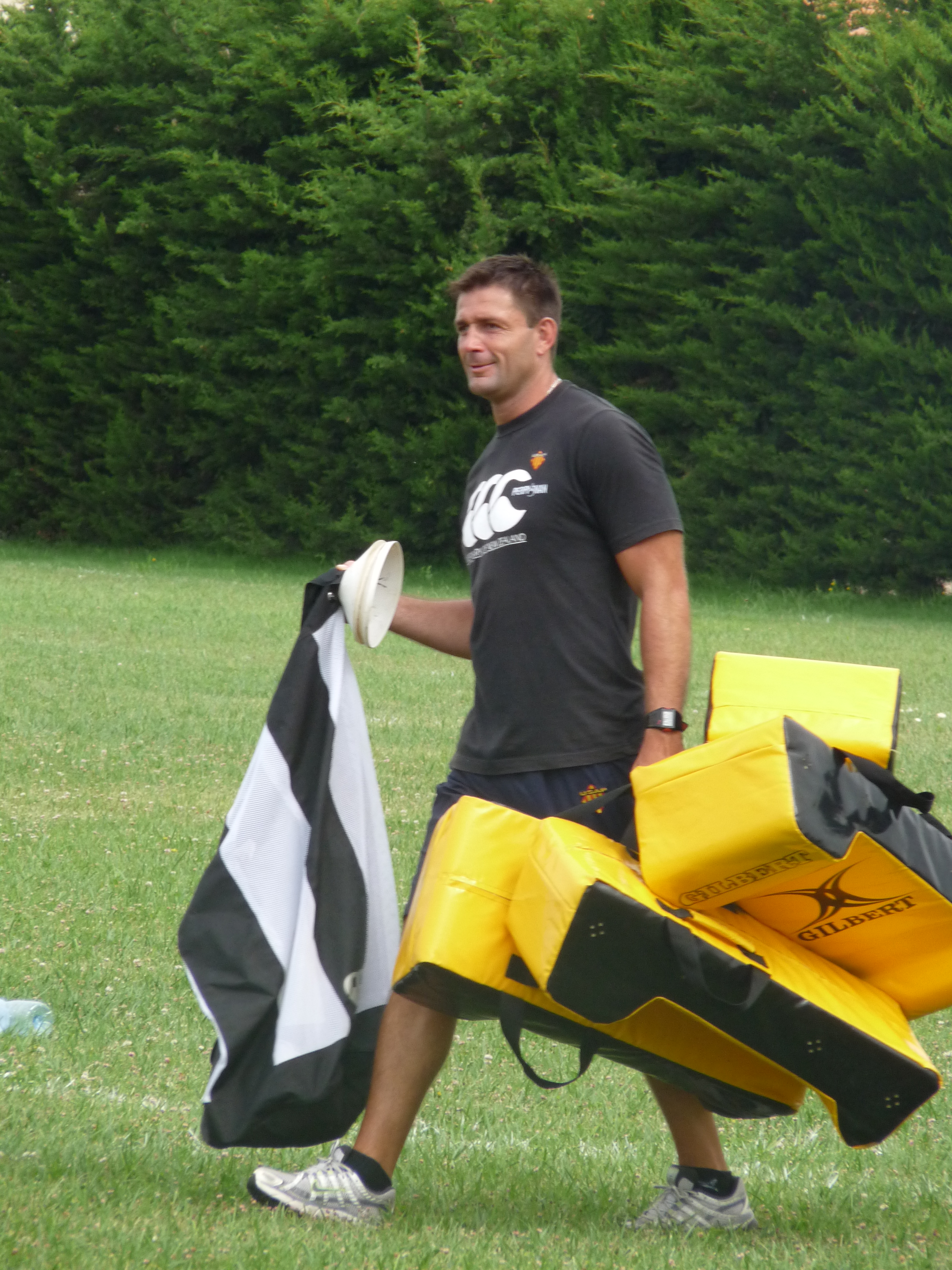 franck azema, entraineur de l'usap